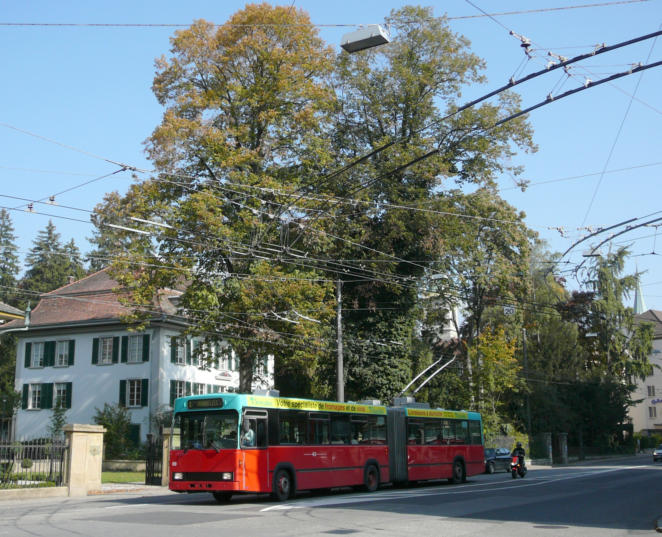 Trolleybus der Verkehrsbetriebe Biel (VB)